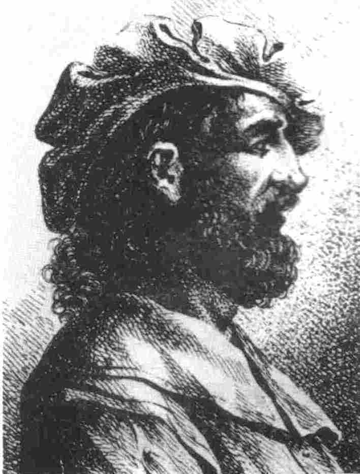 Basinio Basini (Parma 1425- Rimini 1457), umanista e poeta